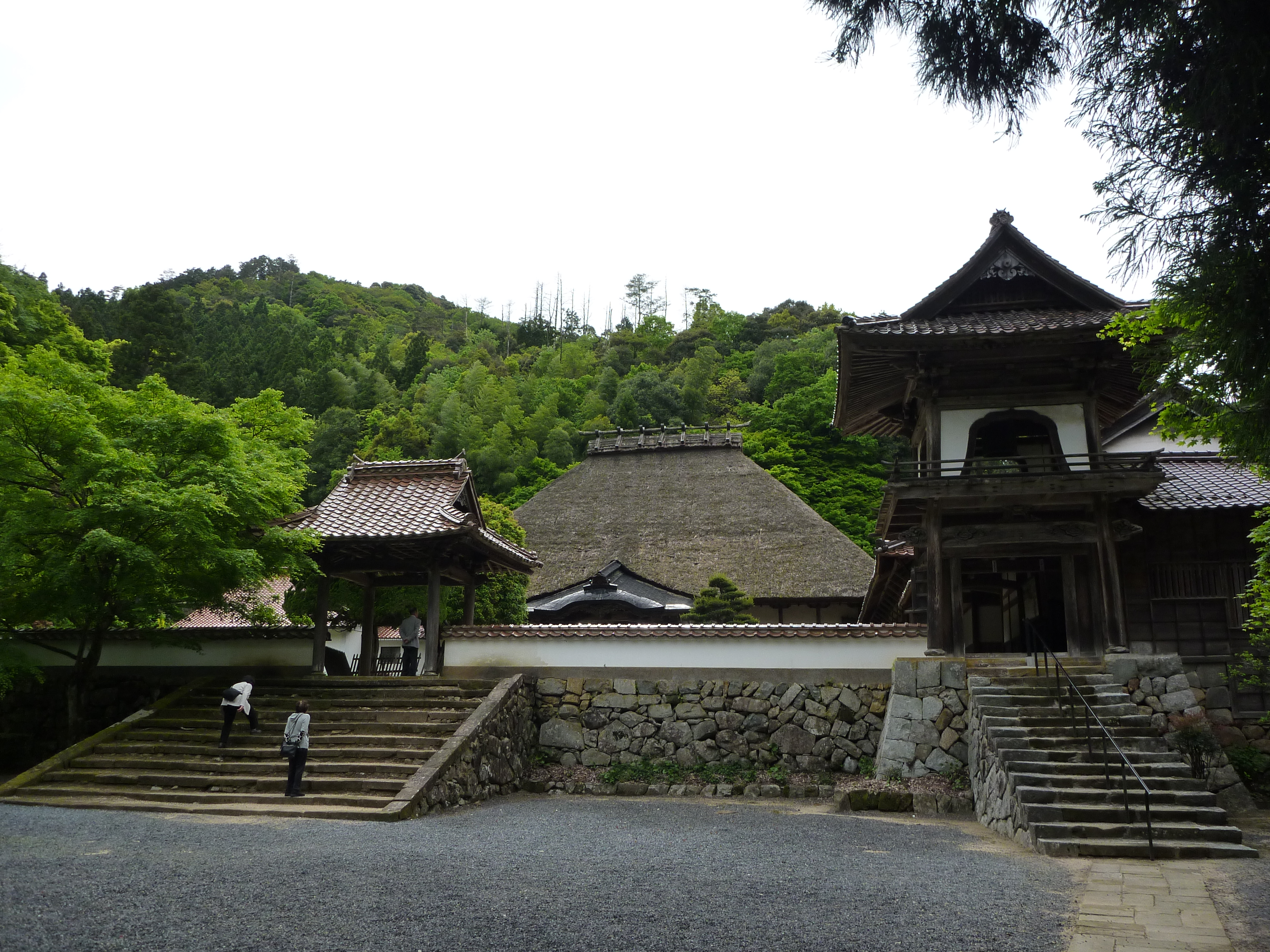 永明寺 2010年5月撮影。